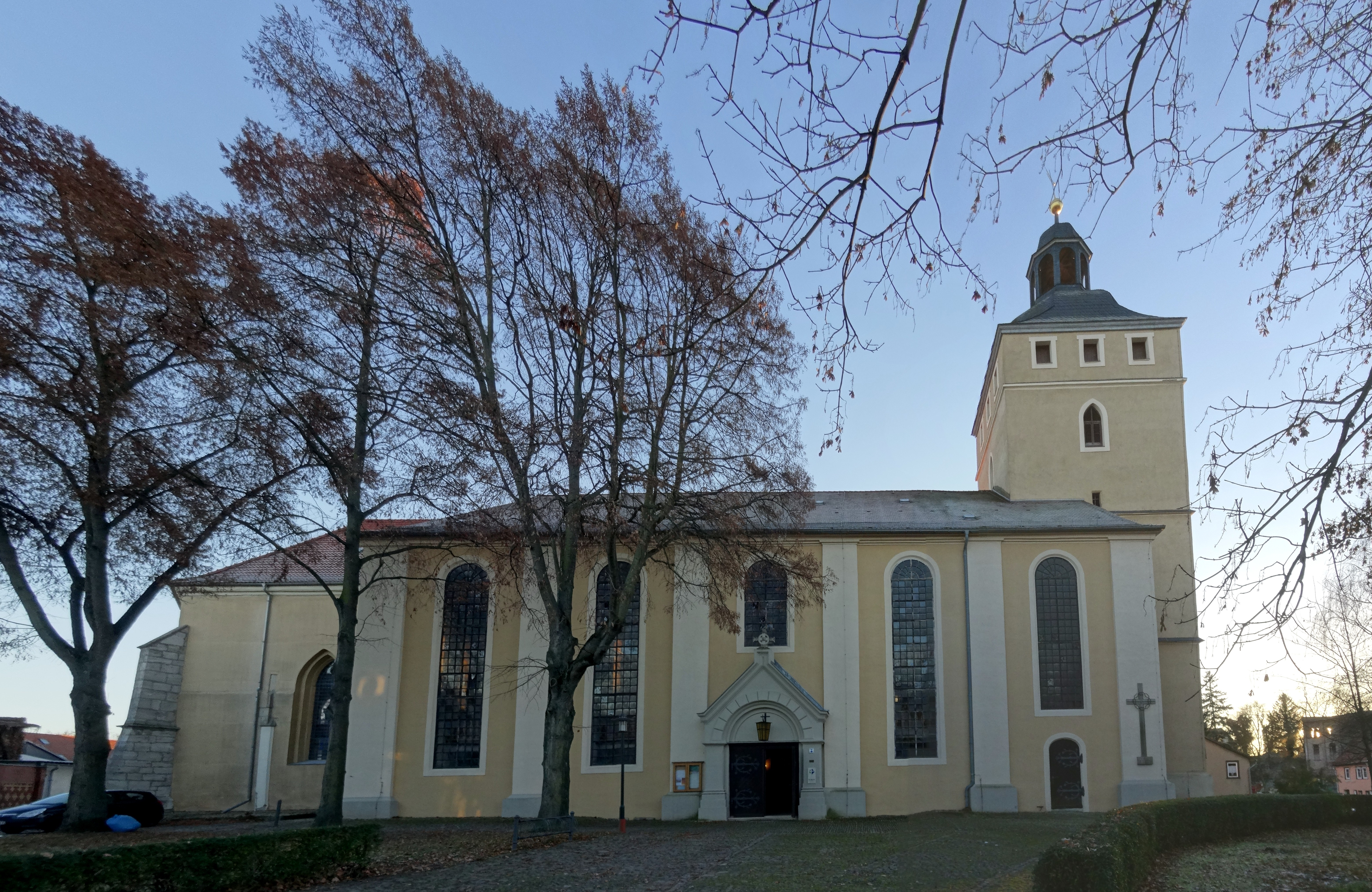 Greußen, Stadtkirche Sankt Martini